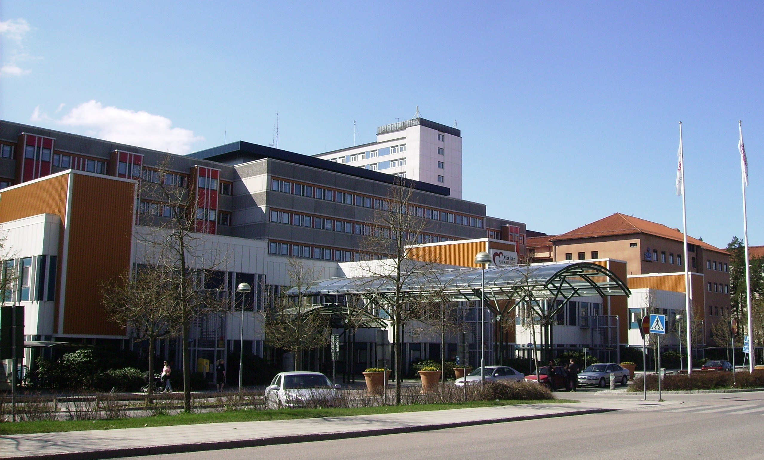 Picture of Mälarsjukhuset, a hospital in Eskilstuna in Södermanlands län, Sweden.